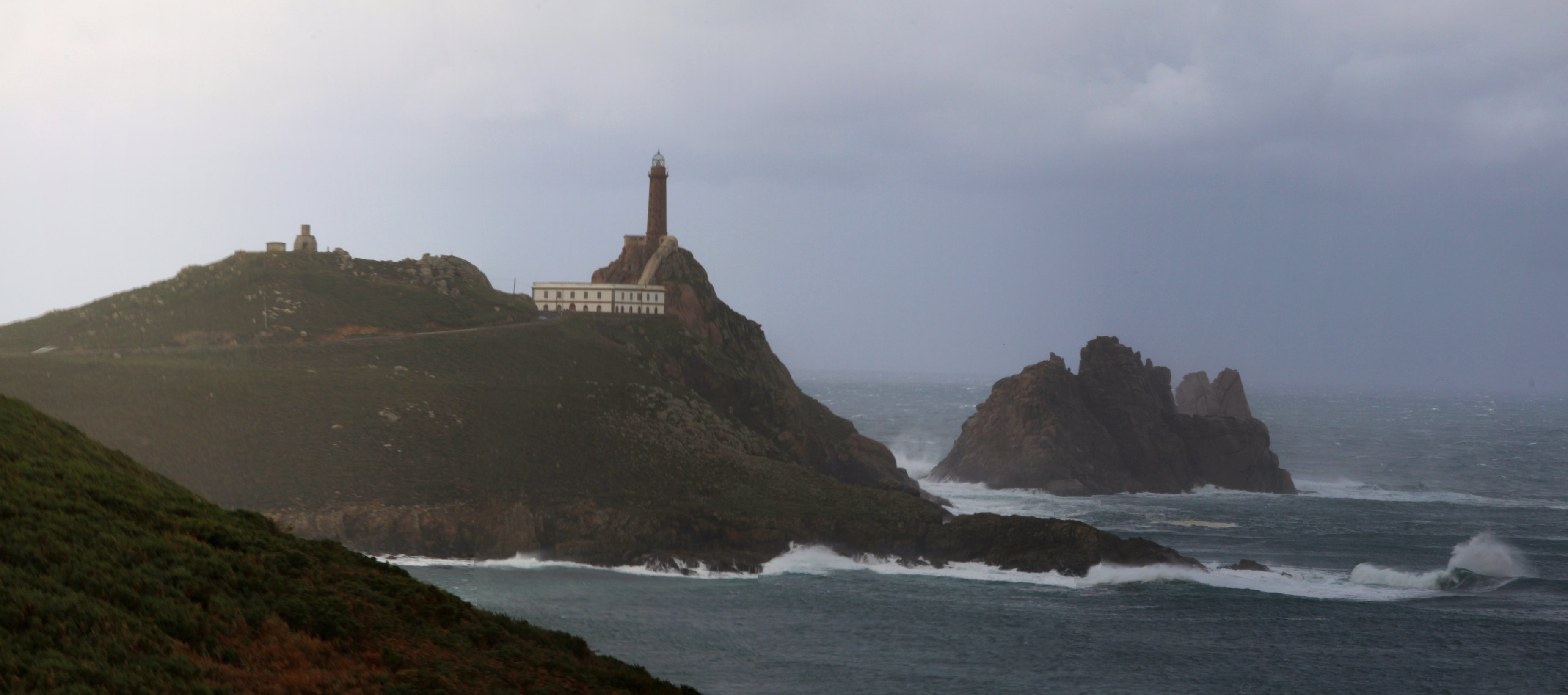 Faro de cabo Vilán, Camariñas, GaliciaGalego: Faro de cabo de Vilán, Camariñas, Galicia